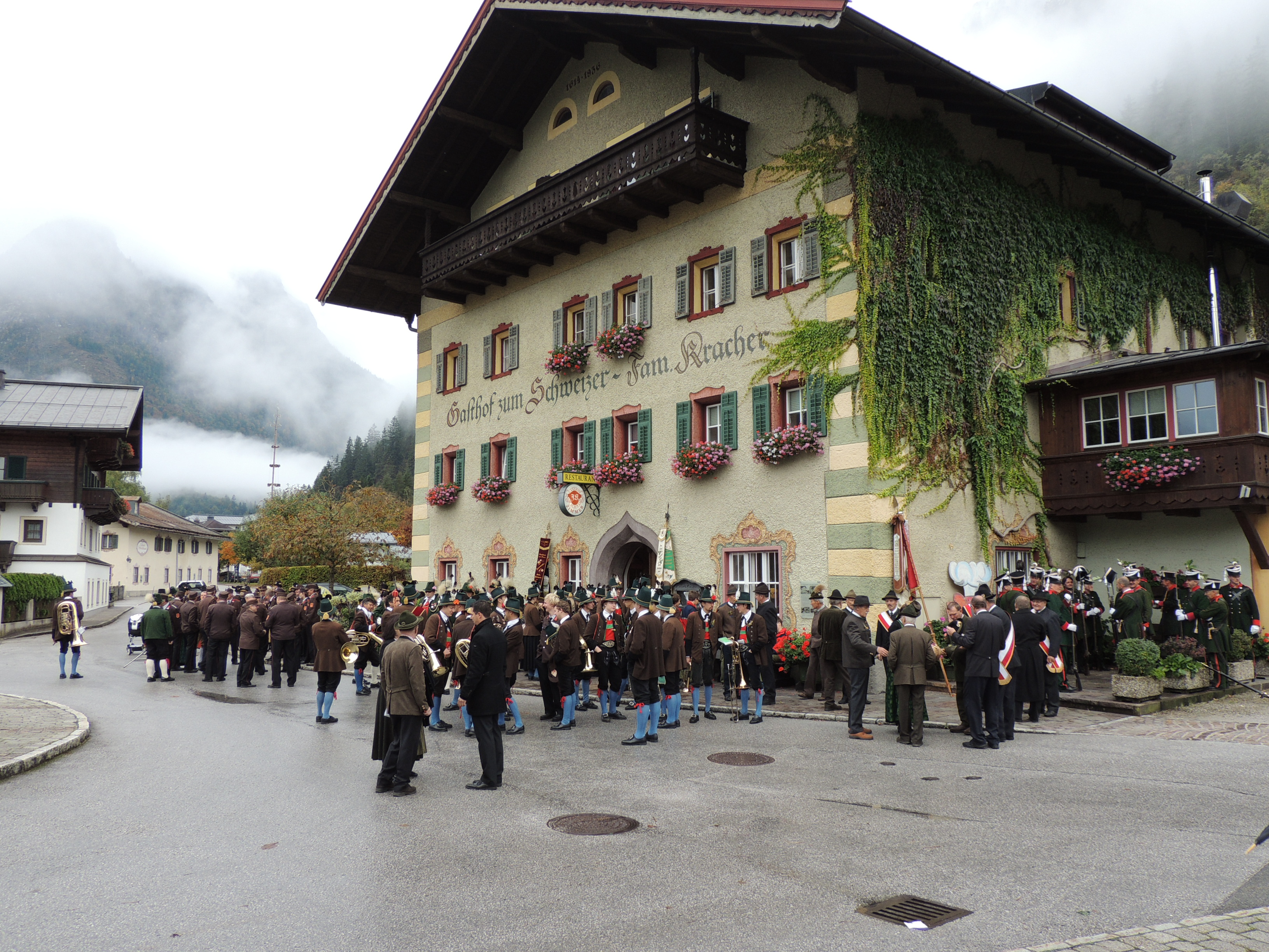 Aufstellung zum Erntedankmarsch vorm Gasthof zum Schweizer